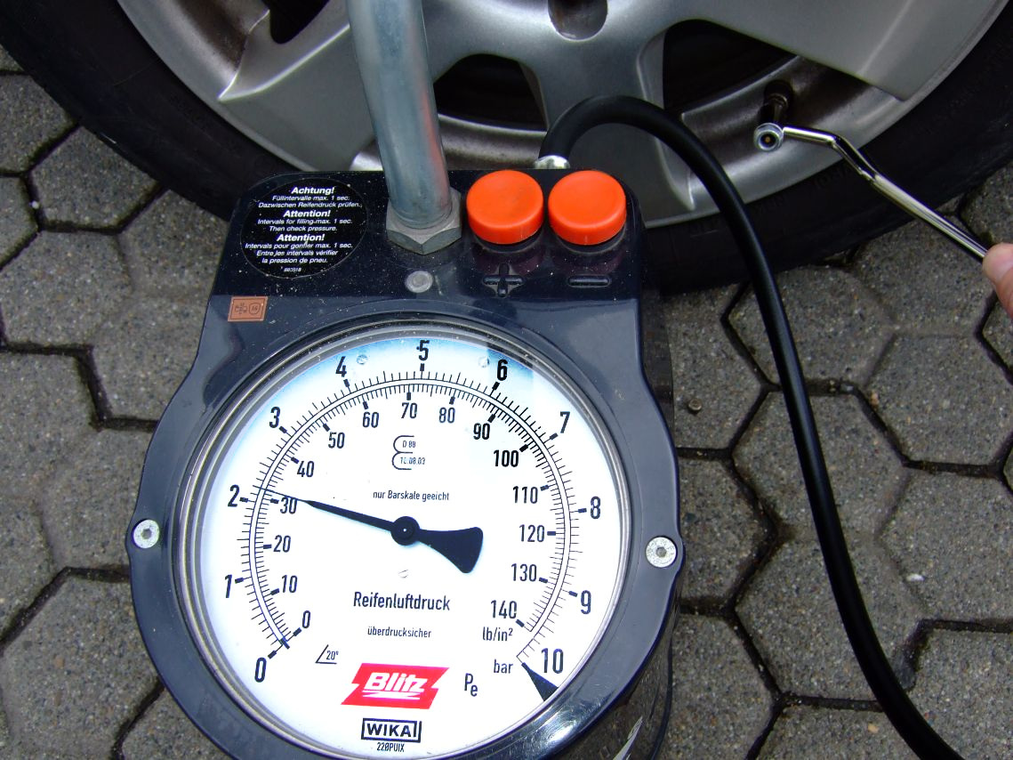 Reifendruck messen